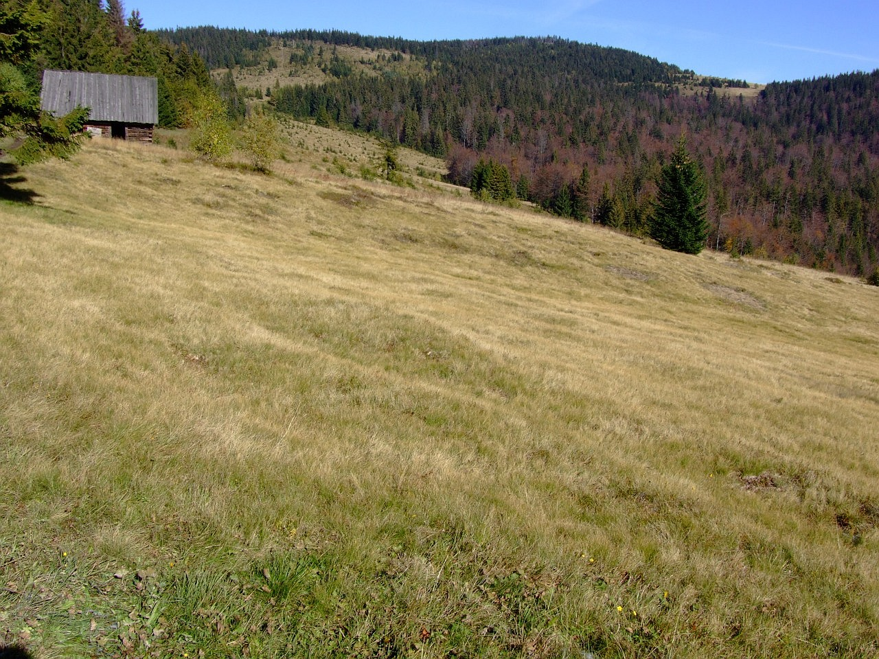 U góry Hale Gorcowskie, przy szałasie i poniżej Hale Podgorcowe